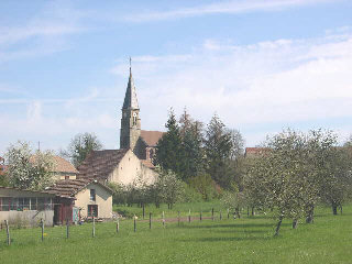 Église de Trévenans (Territoire de Belfort) Photo prise le 20/04/2004 par LP90 Licence GFDL LP90 avril 2004